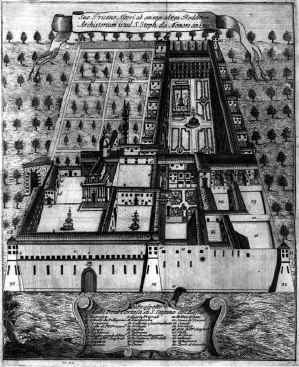 Certosa (Santo Stefano del Bosco) in Serra San Bruno historische Darstellung